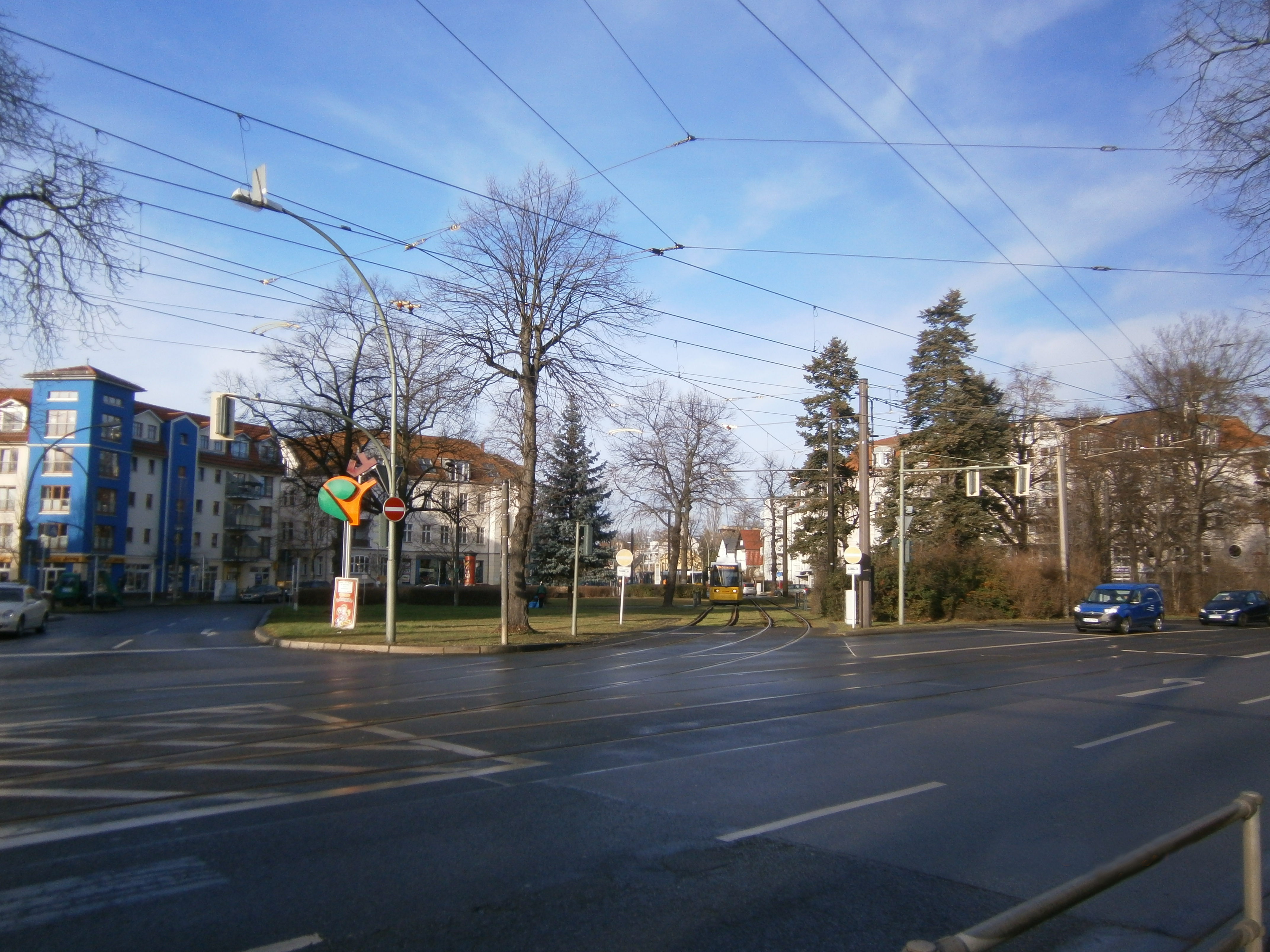 Pastor-Niemöller-Platz ist ein Platz in Berlin-Niederschönhausen, hier der Blick von der Grabbeellee nach Nordwest zur Friedrich-Engel-Straße hin.